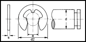 DIN 6799